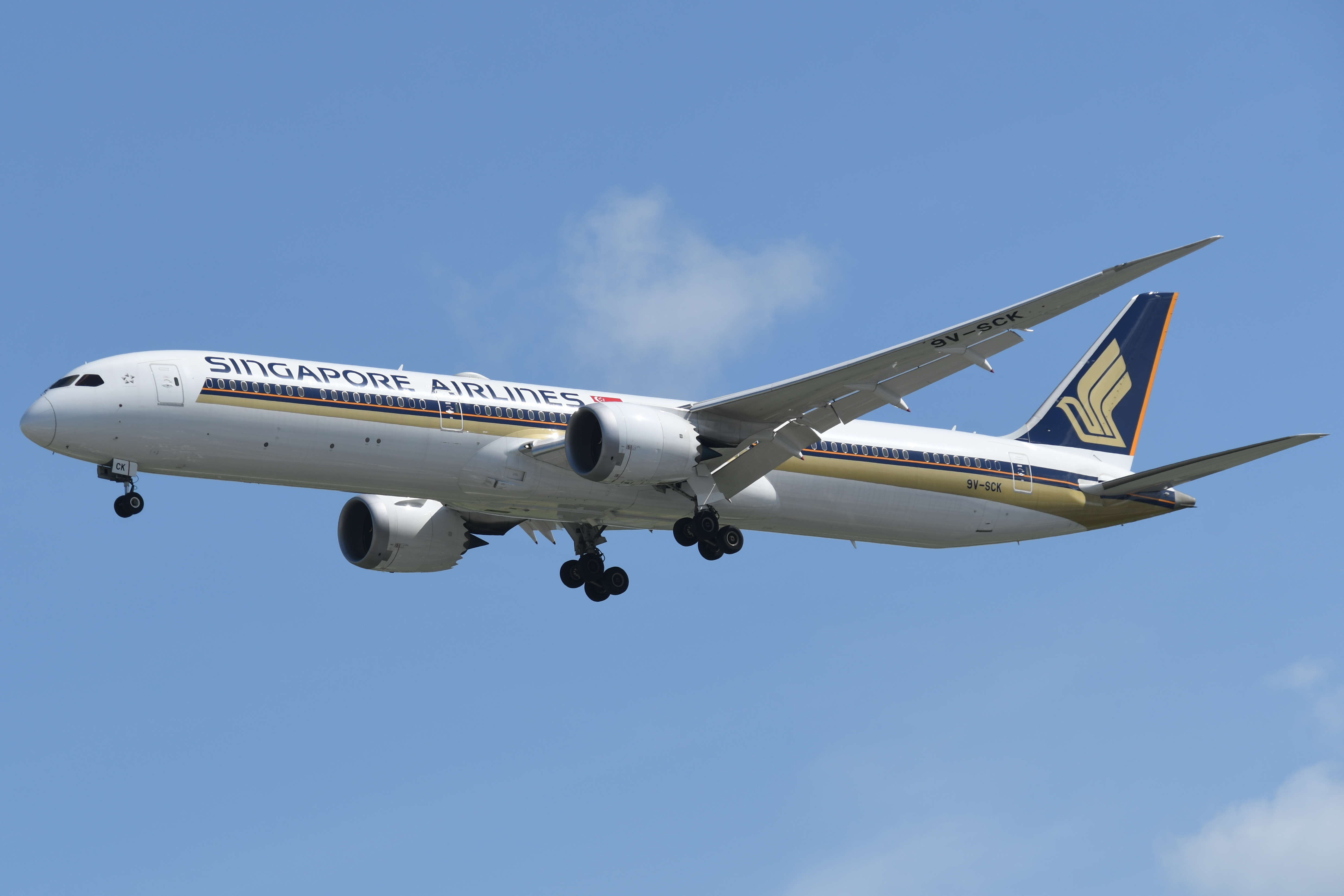 シンガポール航空保有のボーイング787-10